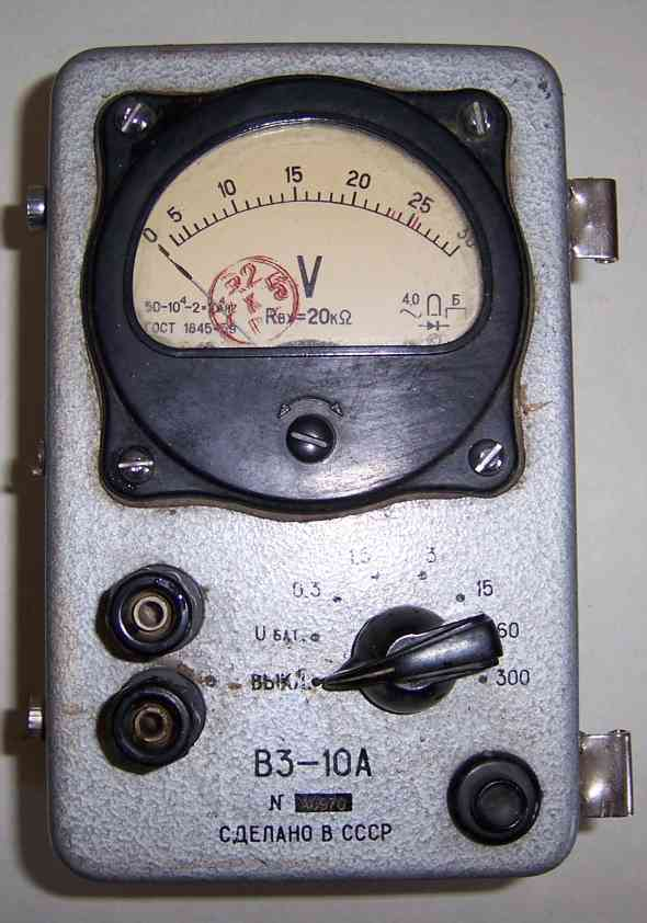 Фотоснимок вольтметра